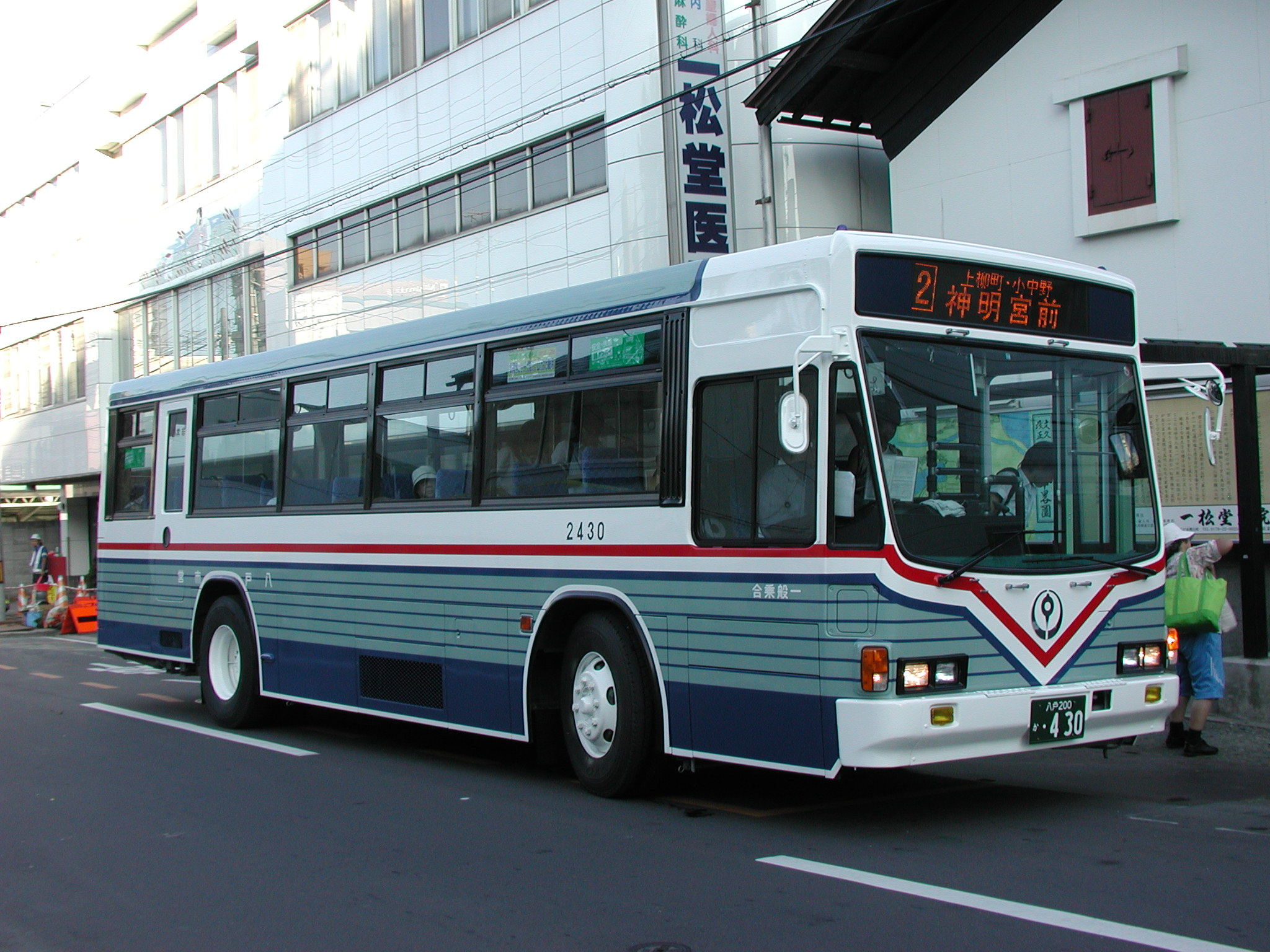 八戸市営バス一般路線塗色（いすゞ・キュービック：U-LV324L/元：国際興業） 朔日町バス停付近にて